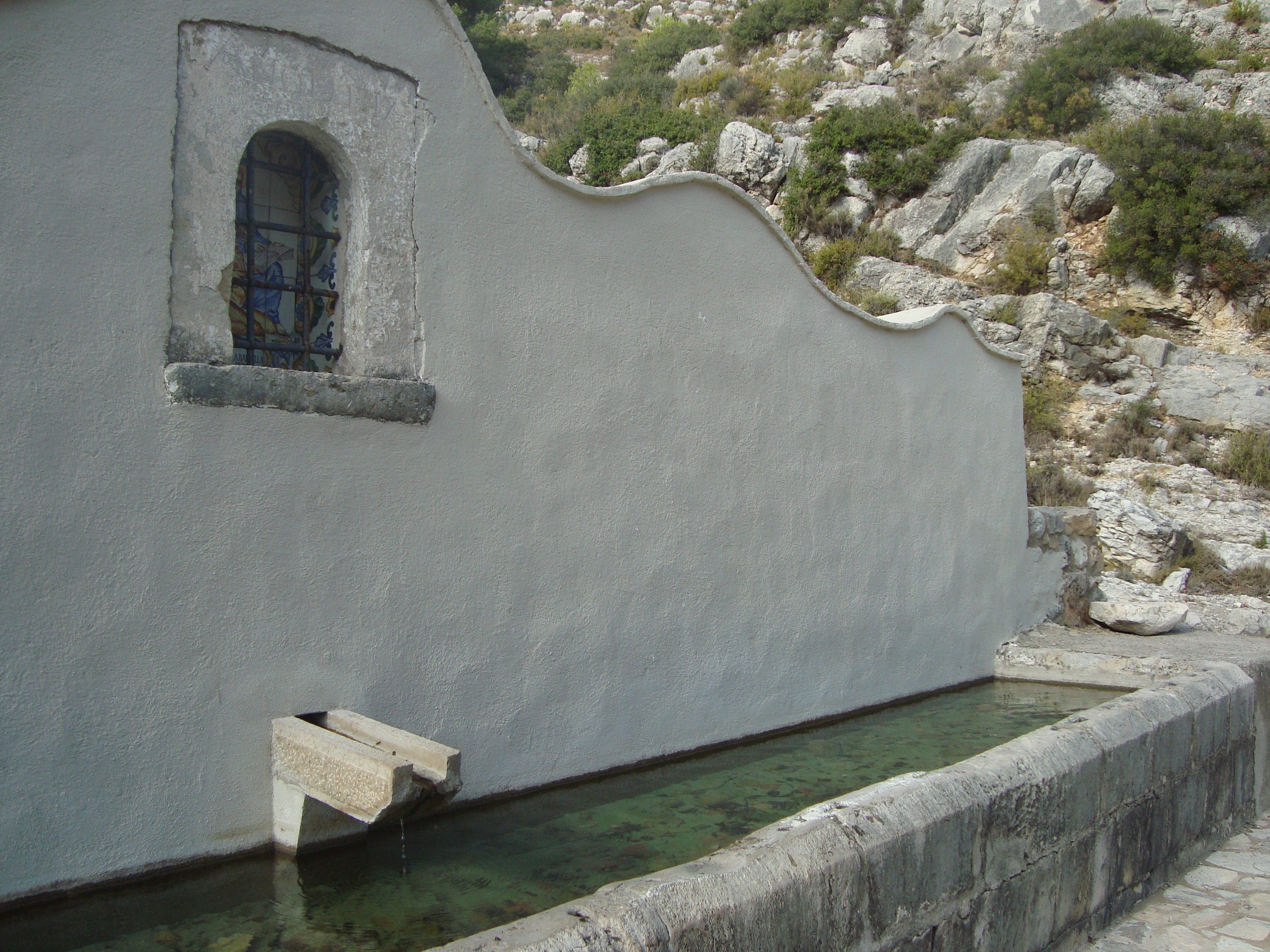 Font de l'Aubelló o Albelló (Xert)